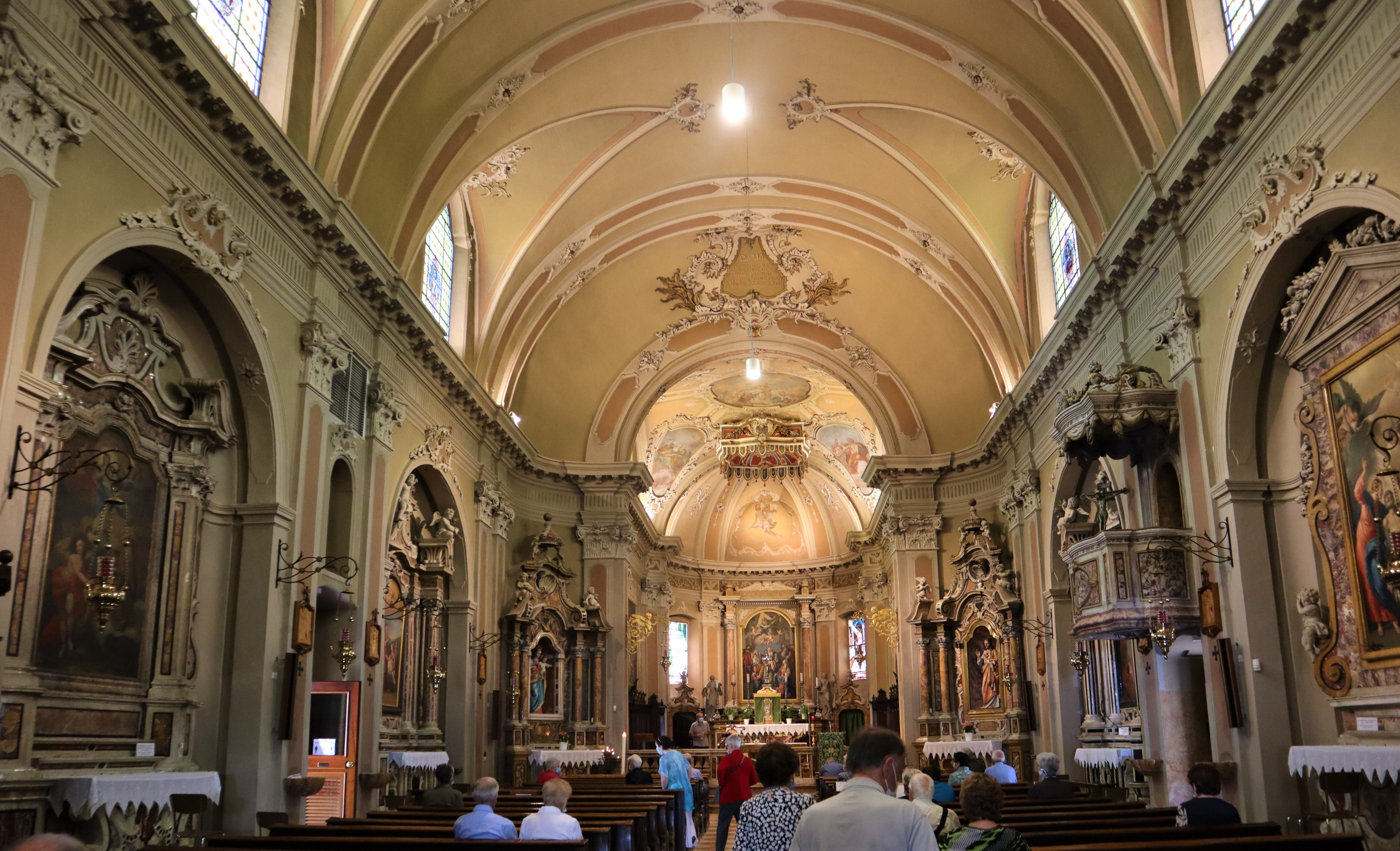 Chiesa parrocchiale della Purificazione di Maria di Volano in Trentino. Interno navata.